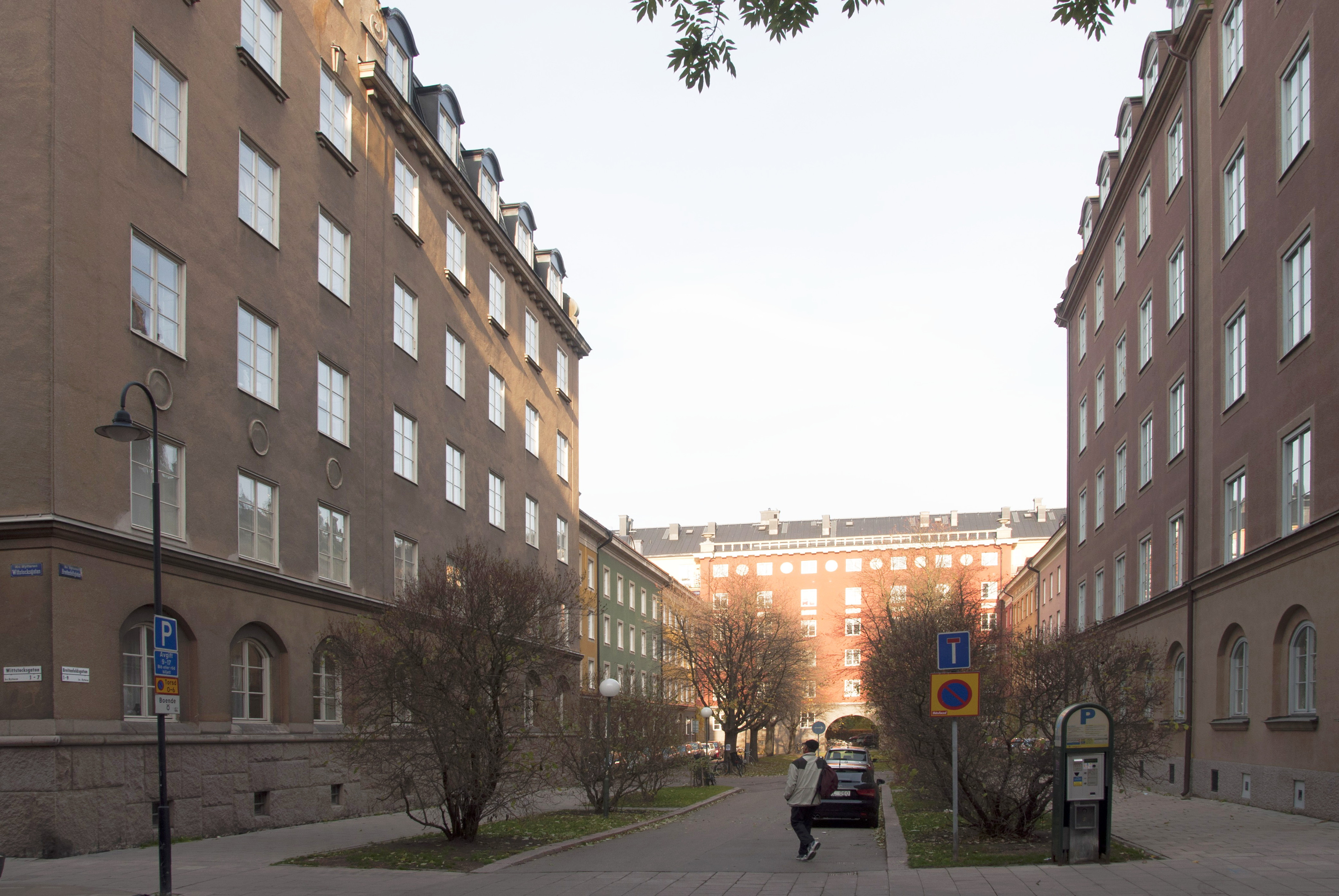 Breitenfeldsgatan